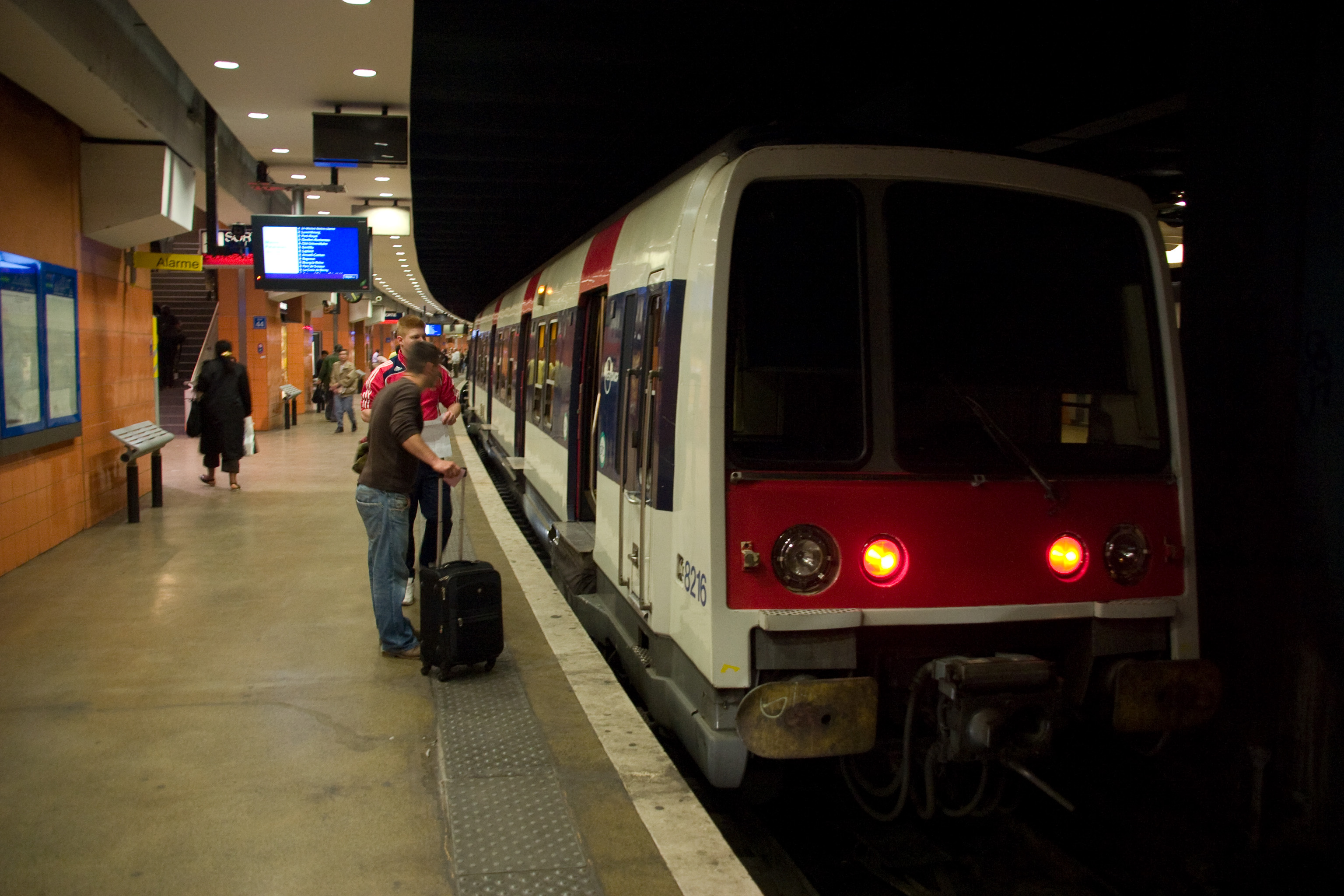 Gare du Nord, Paris, France